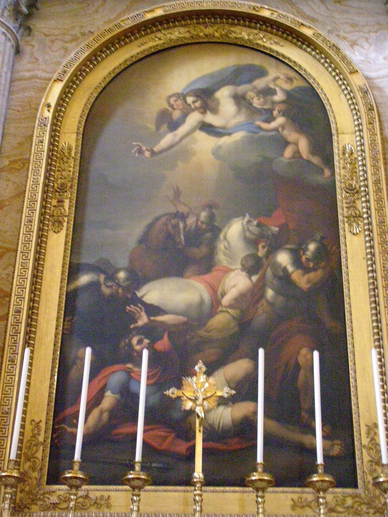 Conversion of St. Paul, way to Damascus. Conversión de San Pablo, camino de Damasco.